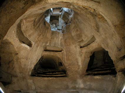 Siracuse, Catacombe de Sainte Lucia - photographie d'une rotonde de la région D